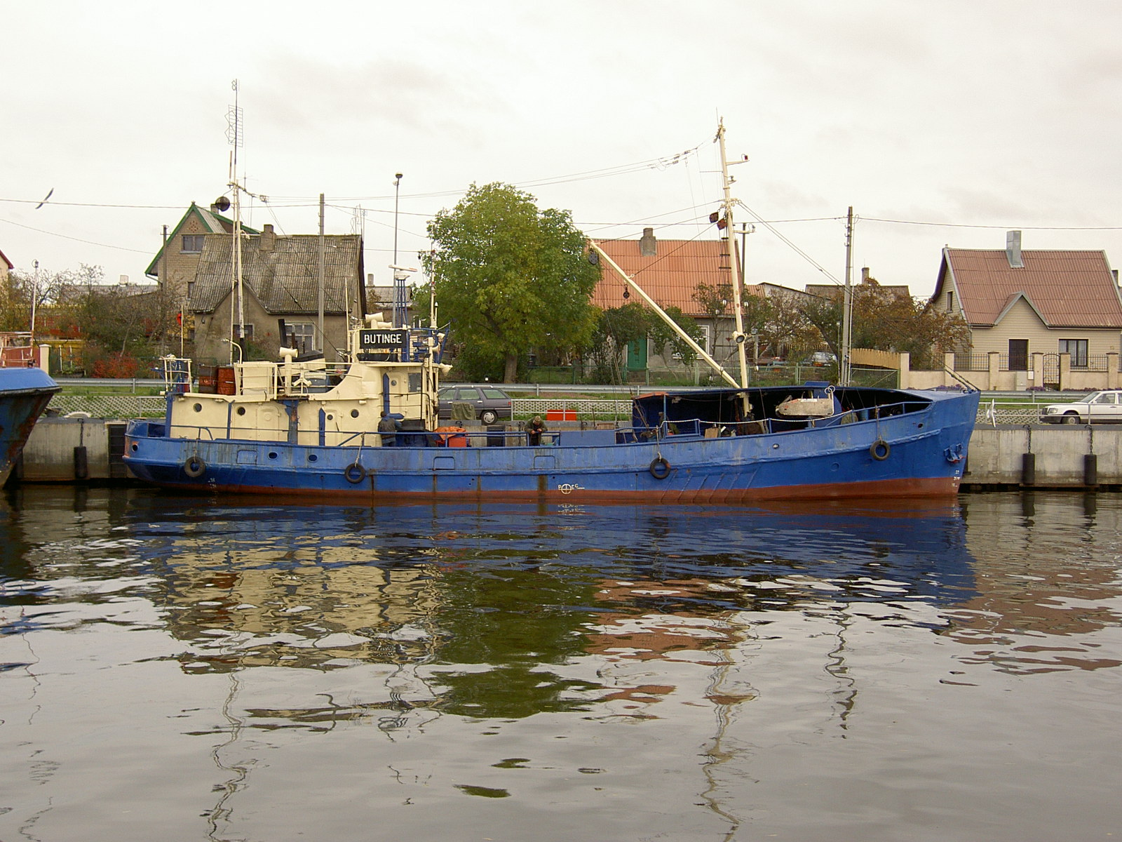 ТБ "BUTINGE"